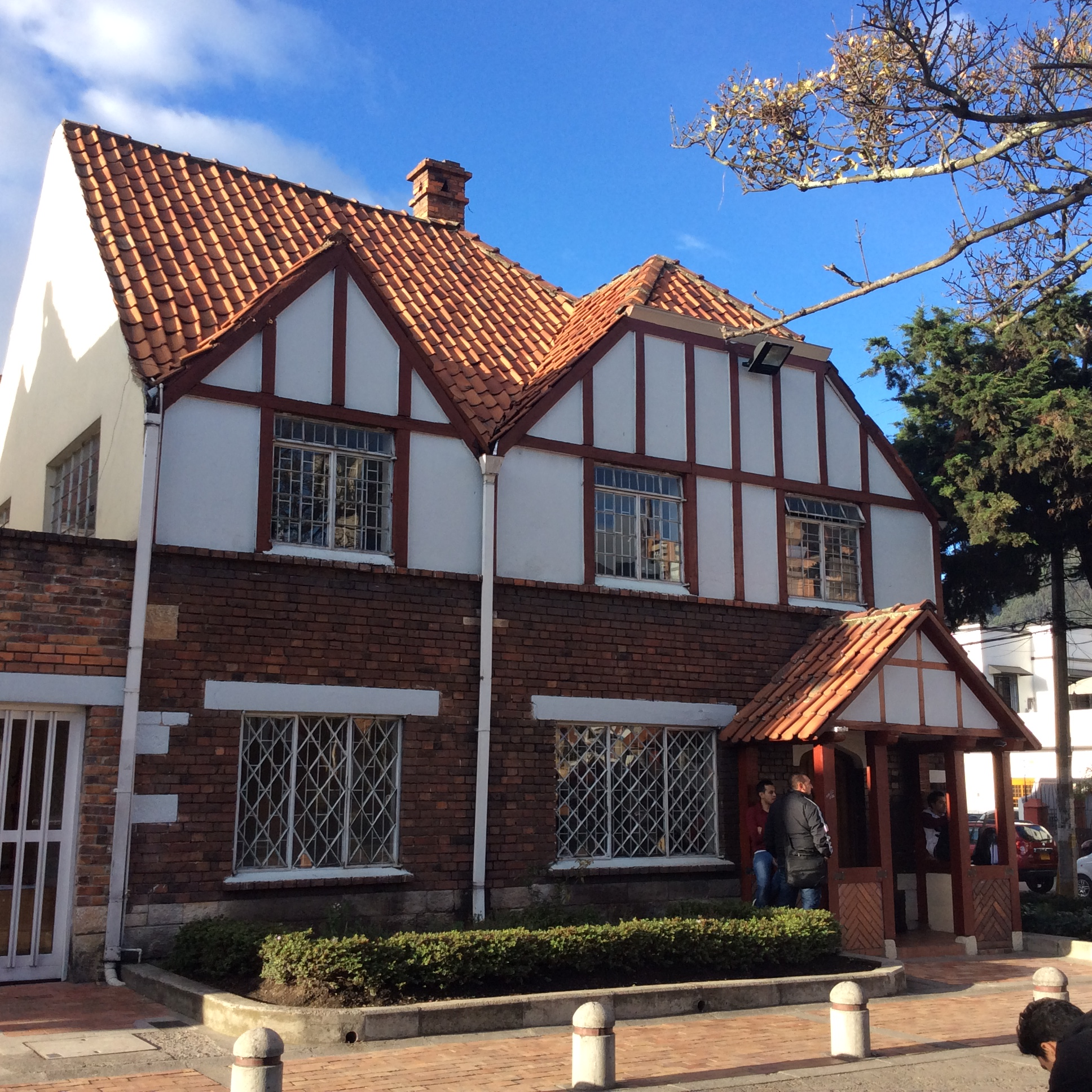 Arquitectura Unipanamericana Fundacion Universitaria